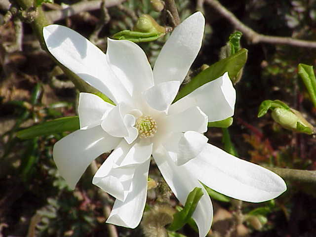 Species: Magnolia stellata Family: Magnoliaceae Image No. 7